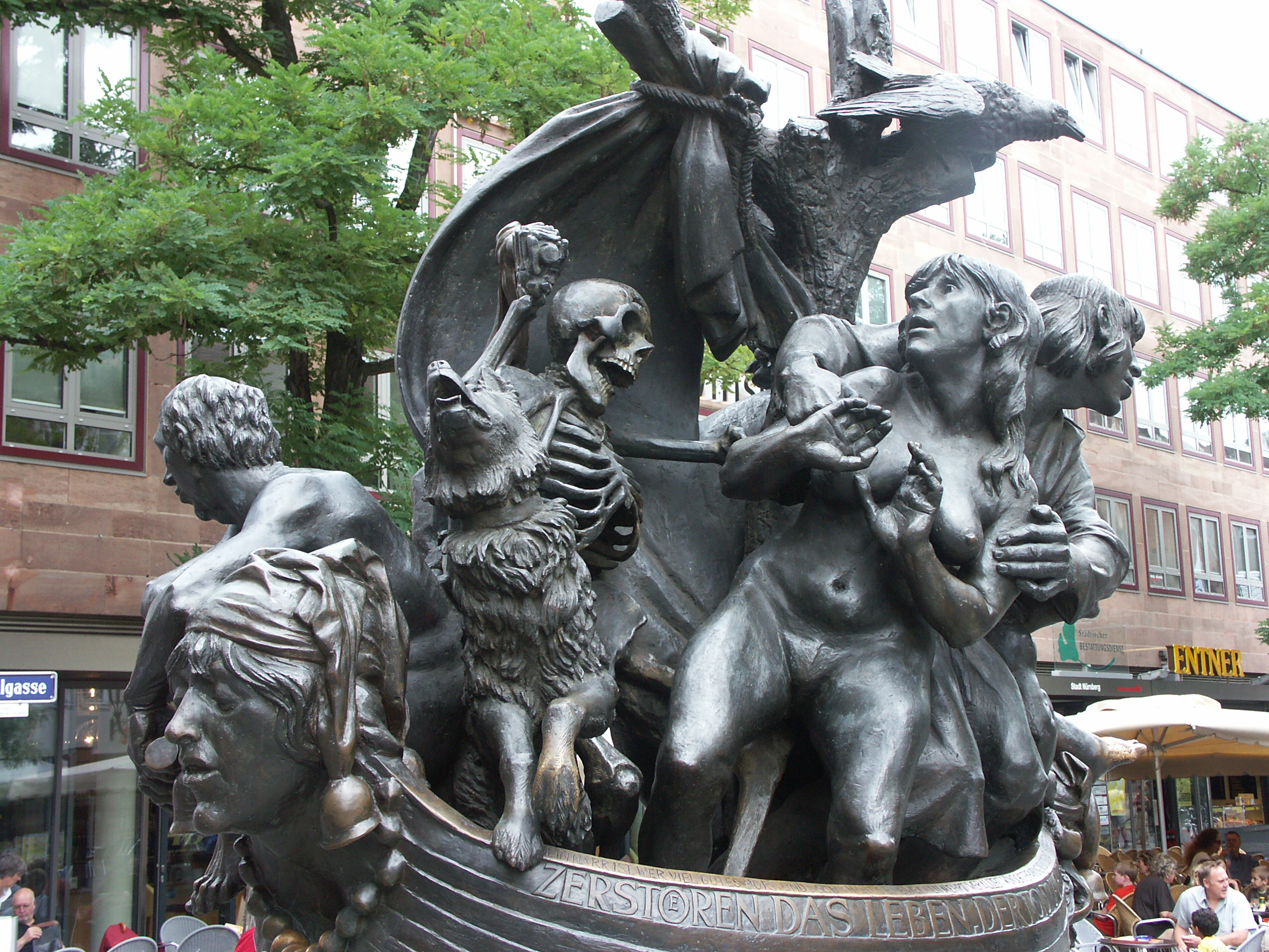 Nürnberg 2008 - Skulptur "Narrenschiff" von Jürgen Weber